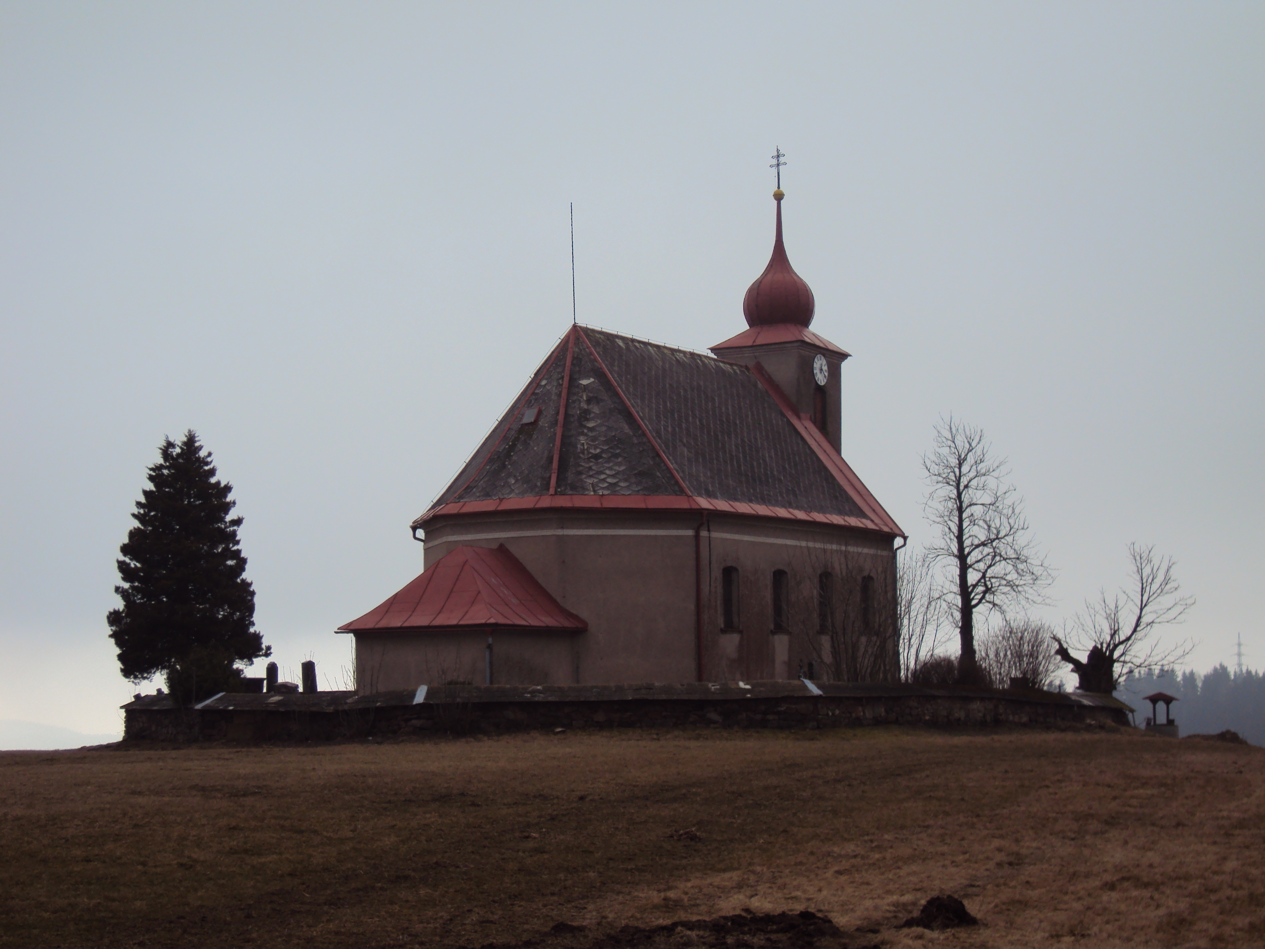 Kostel Valteřice